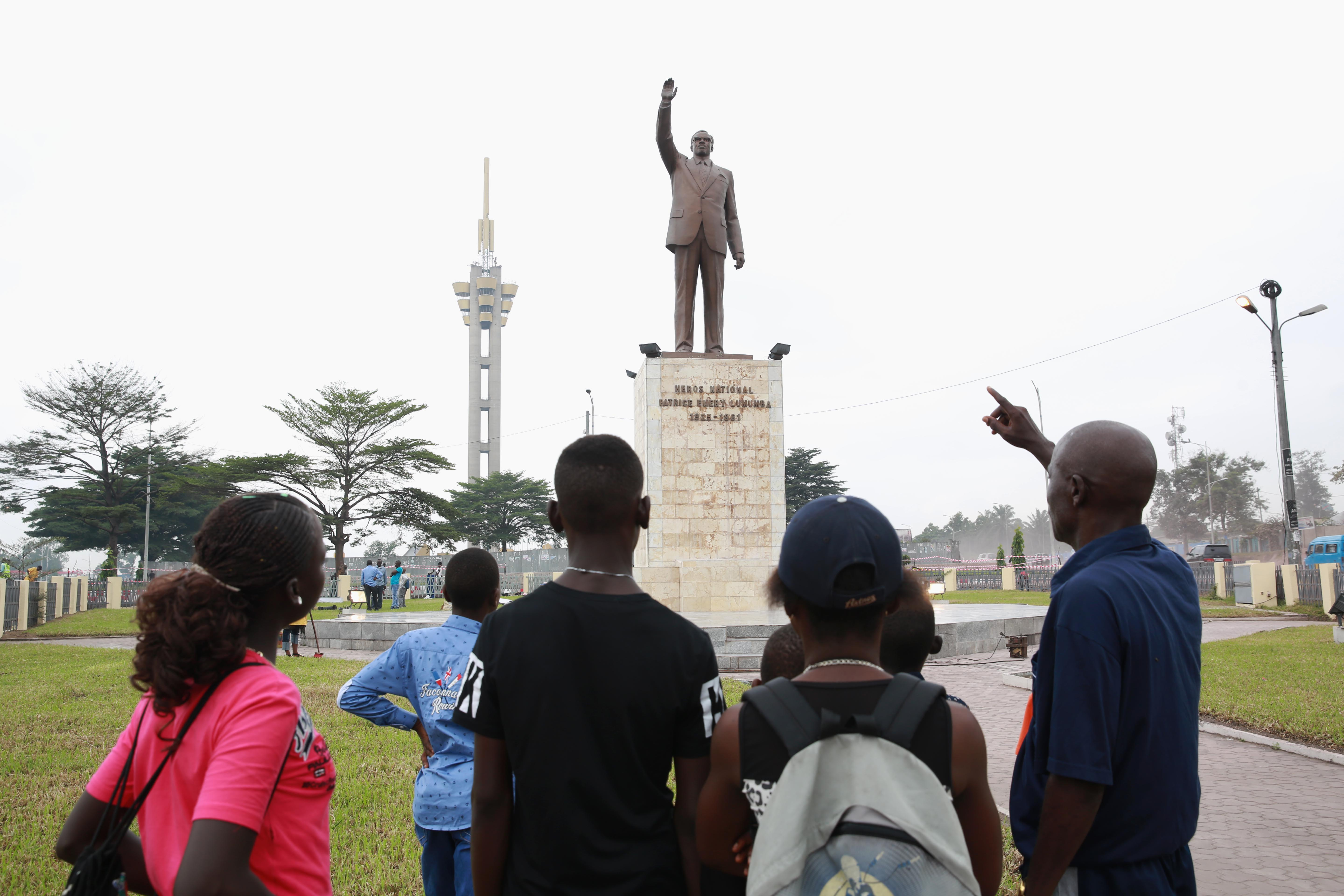 LEGENDE : Le 17 janvier 1961, Patrice Lumumba mourrait, victime de son « rêve » pour un Congo libre, démocratique et développé. C’est certainement ce qu’explique à ses élèves, cet enseignant devant la statue du « premier héros national congolais », en cette Journée qui lui est dédiée. Photo MONUSCO/Abel Kavanagh CAPTION: On 17 January 1961, Patrice Emery Lumumba passed away, victim of his “dream“ for a free, democratic and developed Congo. It is exactly what this teacher, standing in front of the statue of the “1st Congolese National Hero”, is explaining to his students, on this date dedicated to him. Photo MONUSCO/Abel Kavanagh